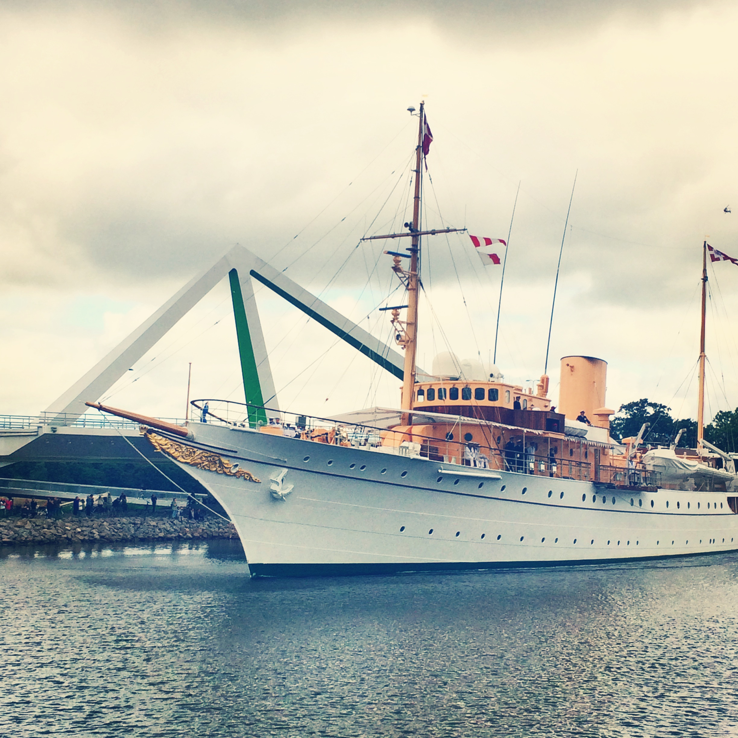 Kongeskibet passerede gennem Odins Bro i juni 2014, som et af de første skibe efter broens åbning